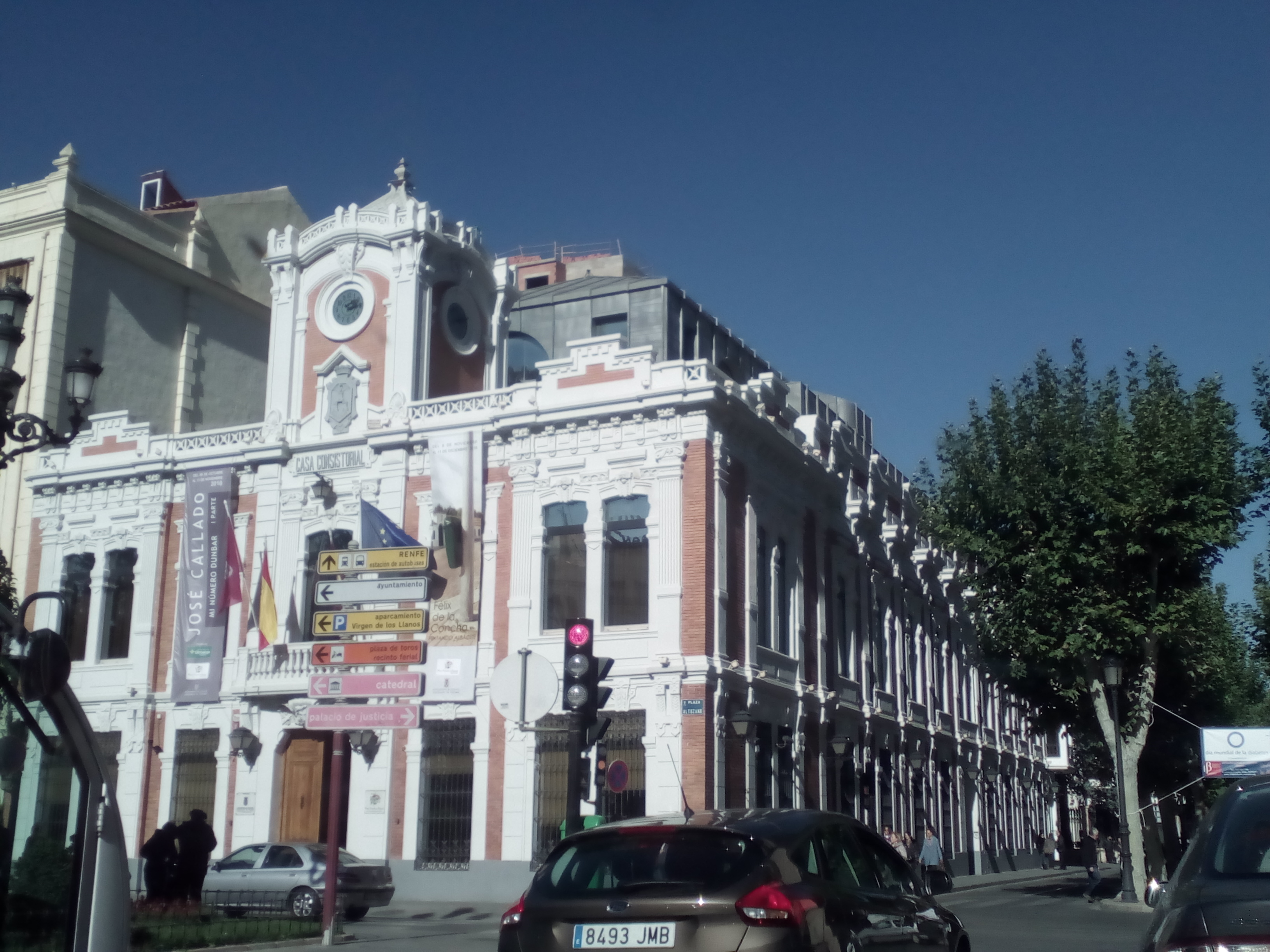 Casa Cortés